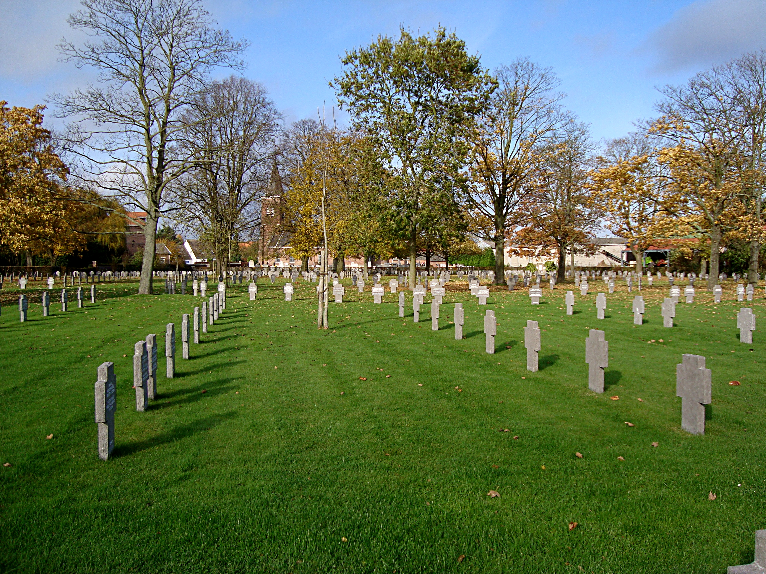 Le cimetière allemand de la première guerre mondiale à Wicres (Nord). 2824 soldats allemands y reposent.